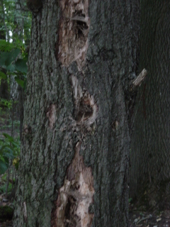 Spechtlöcher